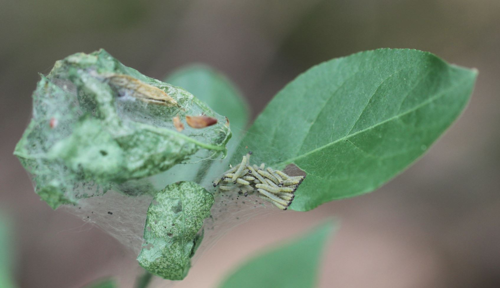 Jungraupen, vermutlich der Pfaffenhütchen-Gespinstmotte (Yponomeuta cagnagella), an einem Gewöhnlichen Spindelstrauch (Euonymus europaeus), am 23. April 2019 nahe Walldorf/Baden